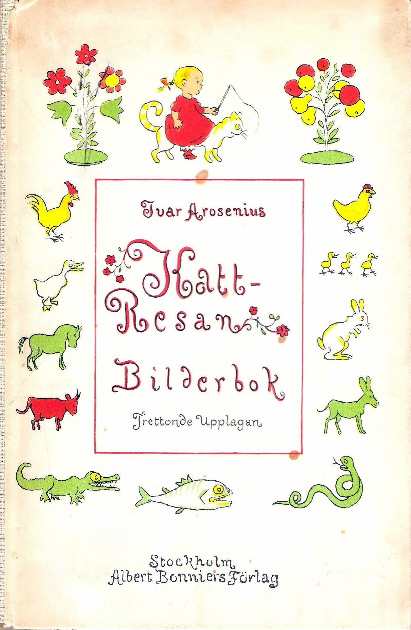 Framsidan till Kattresan av Ivar Arosenius.